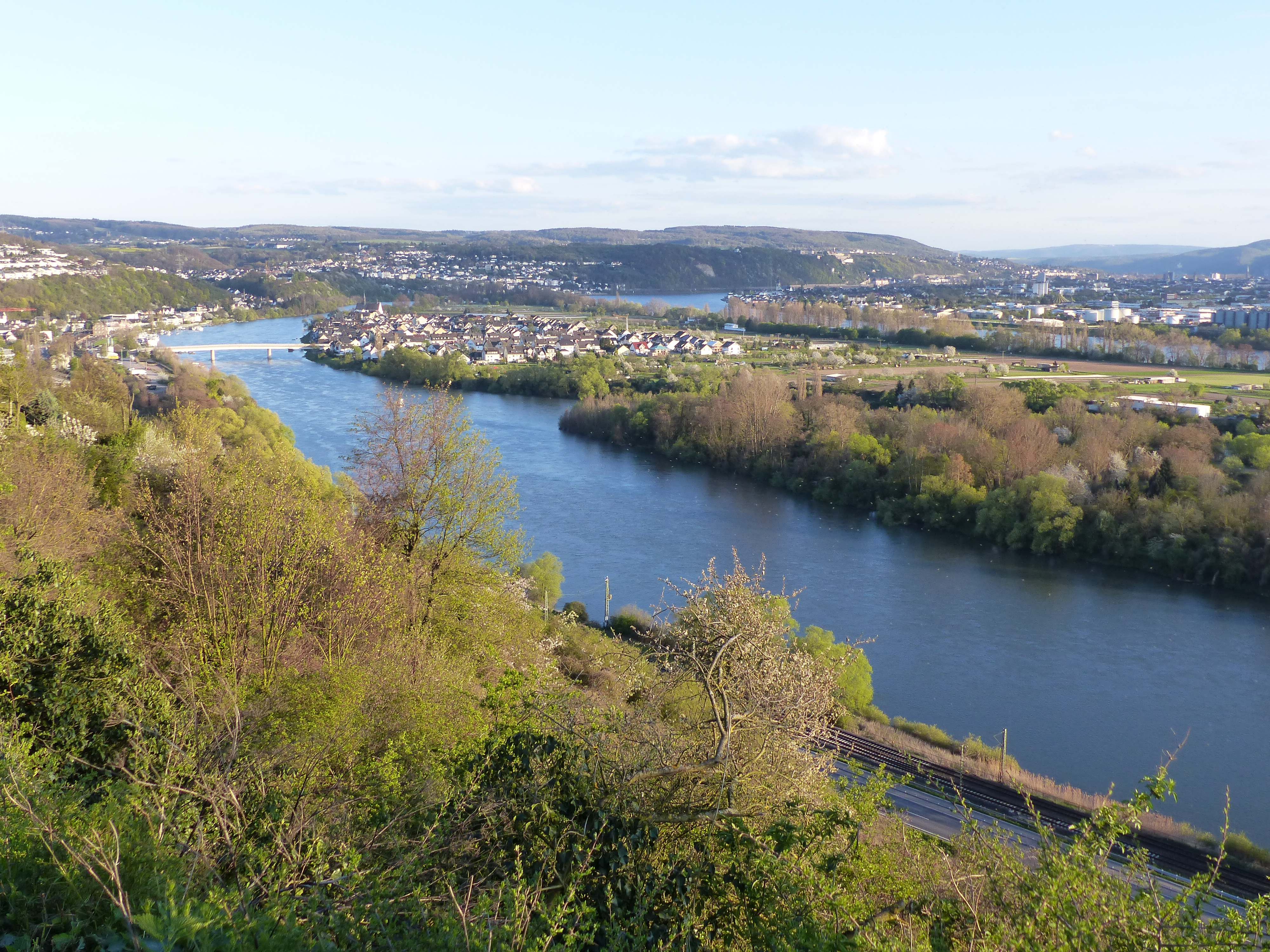 Die Rheininseln Niederwerth (hinten, mit gleichnamigem Ort) und Graswerth (vorne rechts). Blick vom Parkplatz „Auf der Zeg“ der A 48